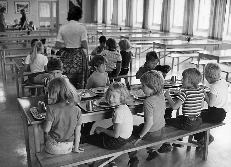 Skolmat.; Byggnadsverk; Personer; Skola; Utbildning och vetenskap; Övrigt